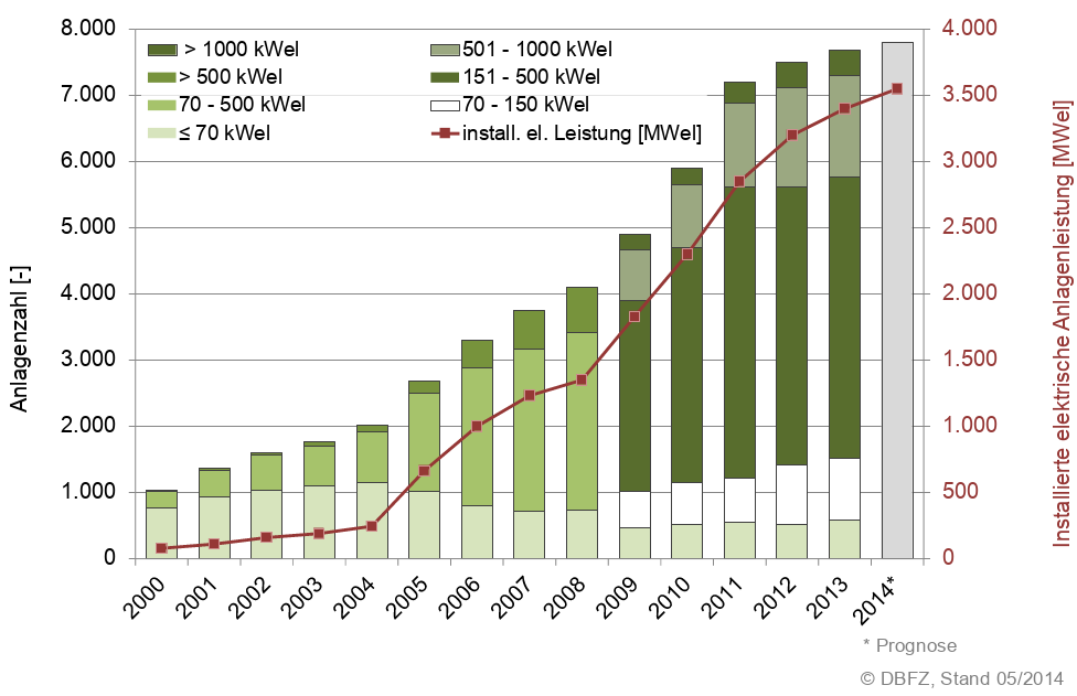 Biogas: Entwicklung der Anlagenzahl und der installierten elektrischen Leistung in Deutschland 2000–2013